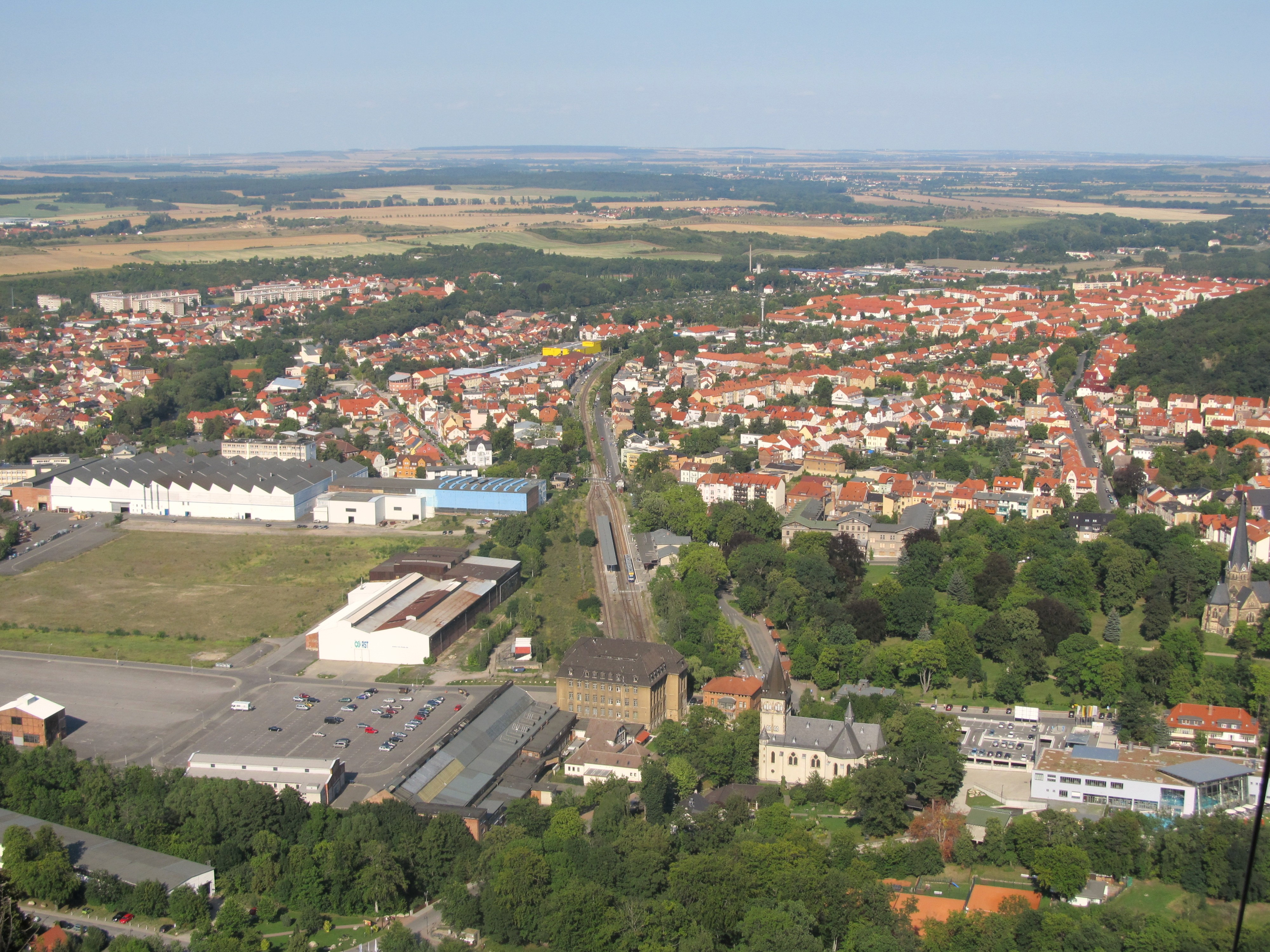 Die Stadt Thale im Landkreis Harz in Sachsen-Anhalt, Deutschland. Blick von Westen. Vorne die katholische Herz-Jesu-Kirche und dahinter der Hauptbahnhof. Rechts die Sankt-Petri-Kirche und ein Teil der Bodetal Therme. Links vom Hauptbahnhof befindet sich das Firmengelände des Maschinenbauunternehmens THALETEC GmbH.